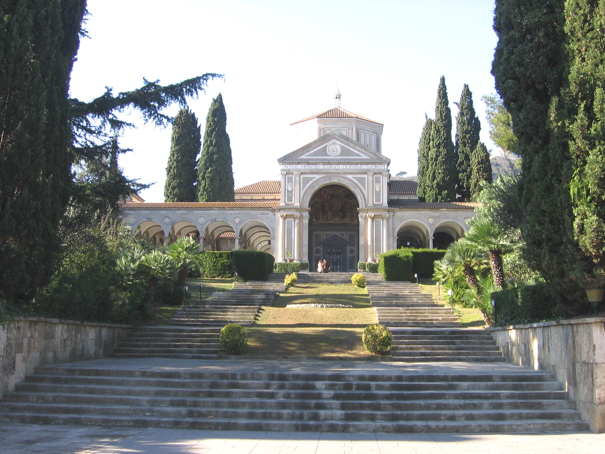 Iglesia de Santa María Reina, Barcelona.